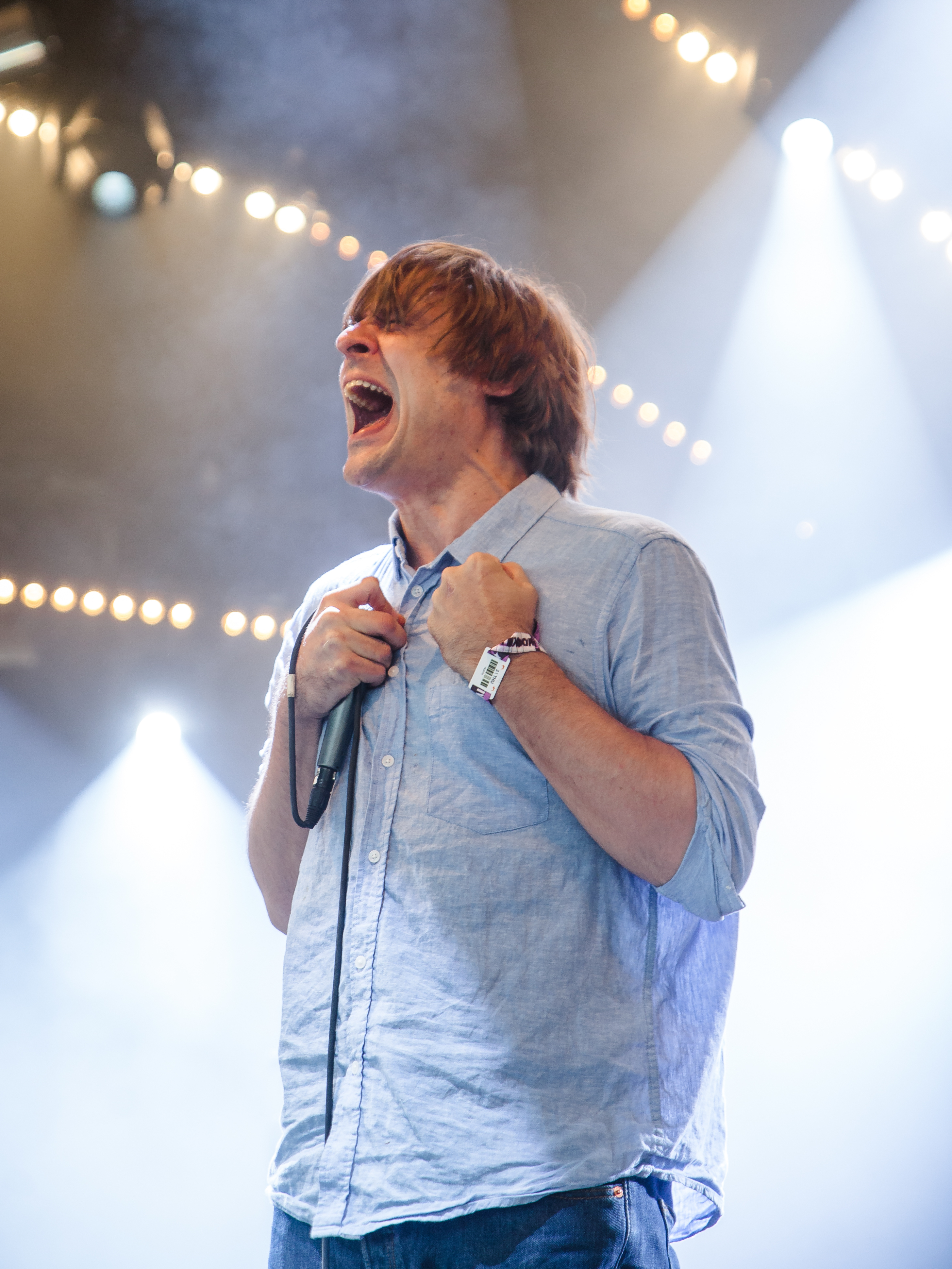 Festivalsommer This photo was created with the support of donations to Wikimedia Deutschland in the context of the CPB project "Festival Summer".